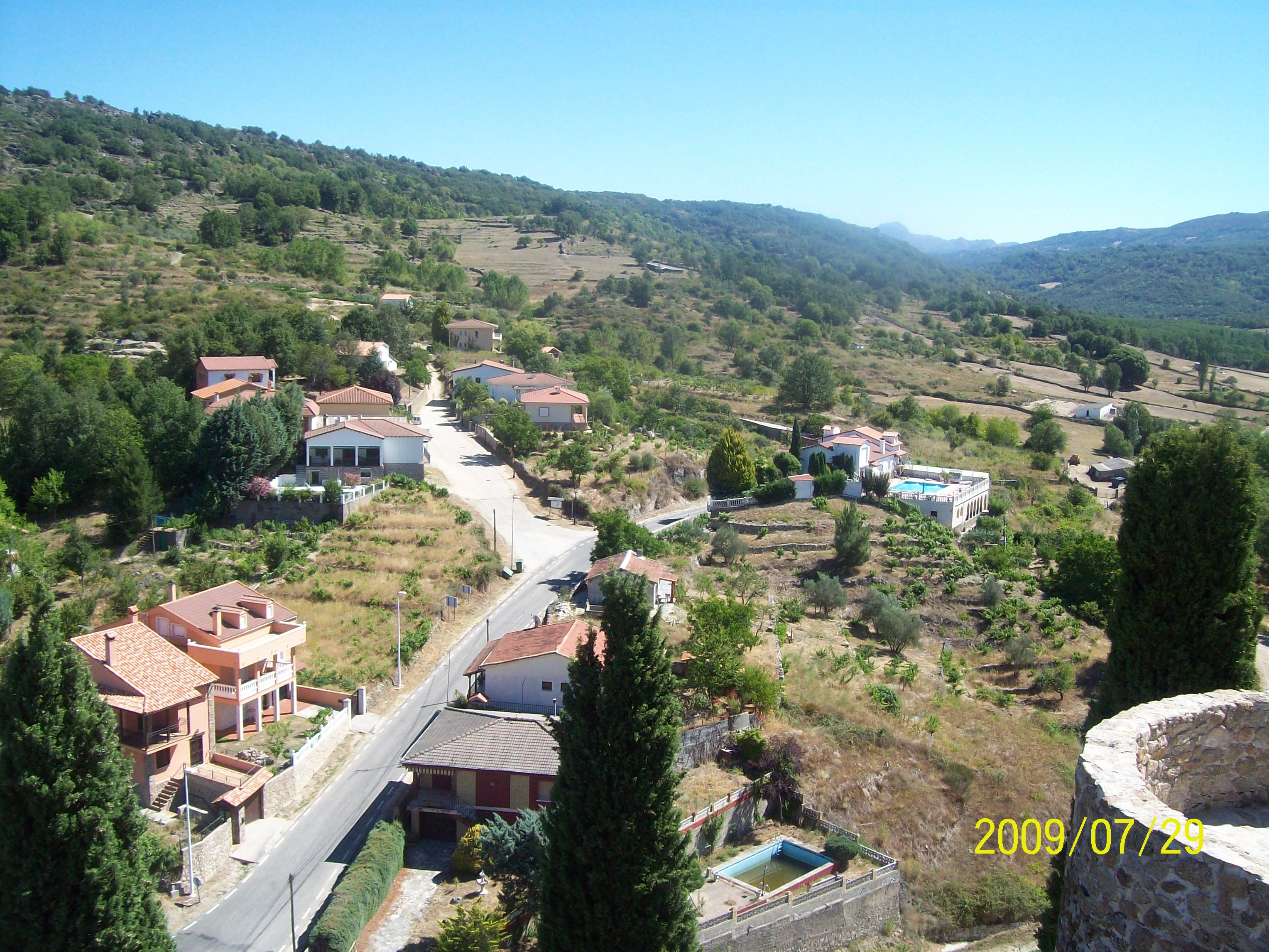 Semeya del llímite del pueblu